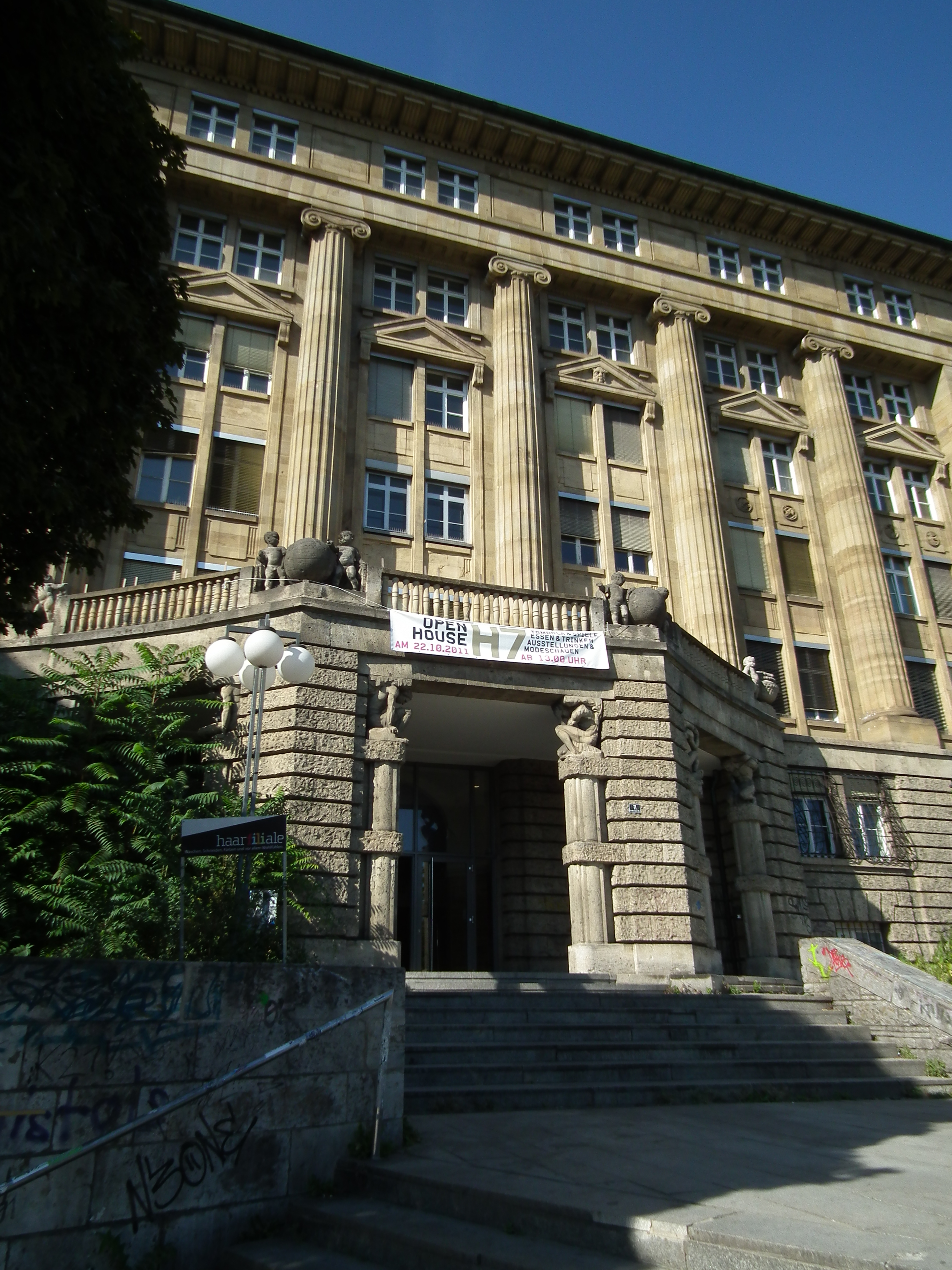 Gebäude in der Heilbronner Straße 7 in Stuttgart, ehemalige Reichsbahndirektion bzw. Bundesbahndirektion (Baden-Württemberg, Deutschland)